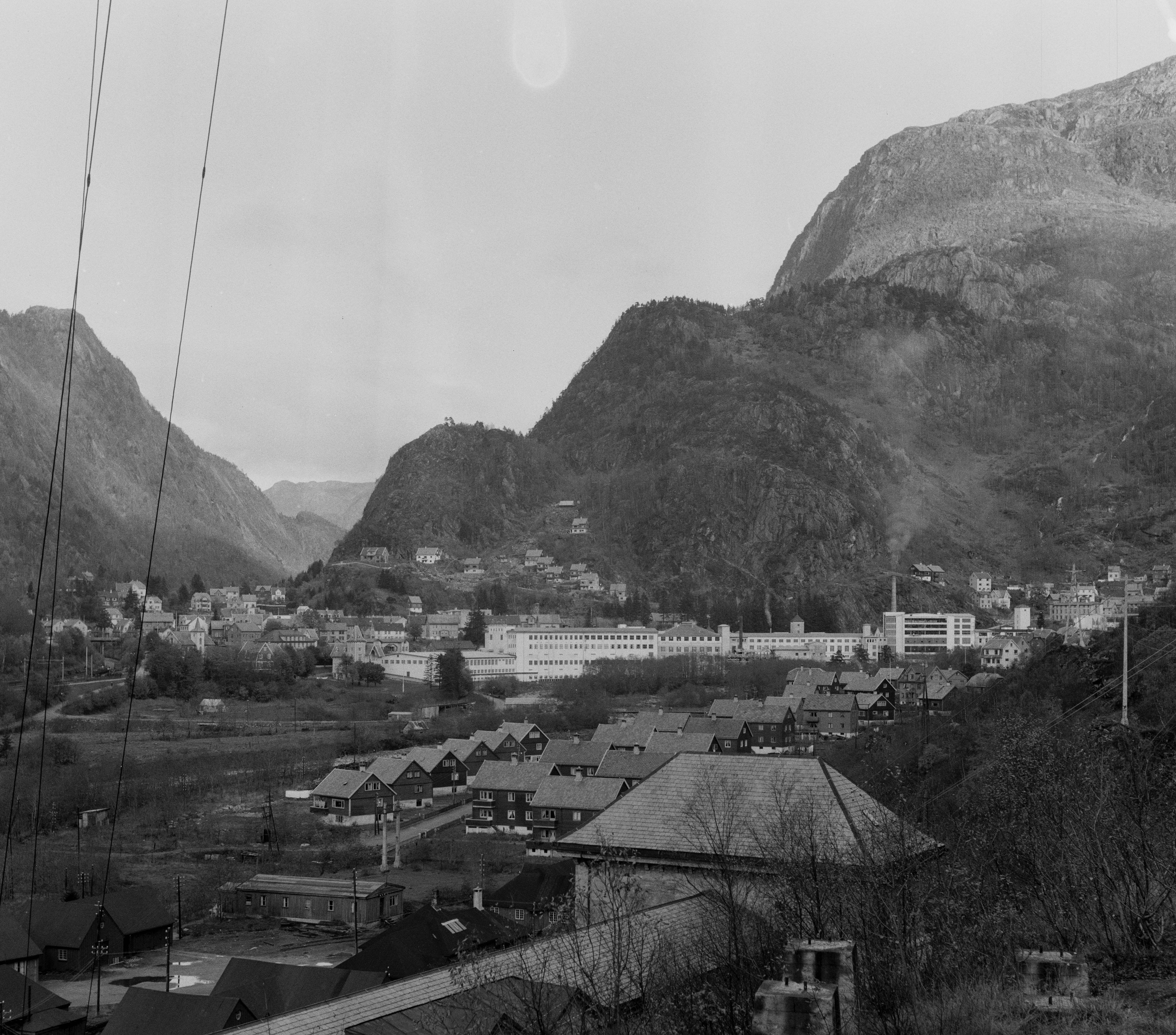 Bildet er hentet fra Arkivverket. Dale i Vaksdal. Foto tatt i forbindelse med reportasje om Dale fabrikker. NÅ nr. 25, 1953 Arkivinstitusjon : Riksarkivet Arkivnavn : Billedbladet NÅ Sted : Norge, Hordaland, Vaksdal, Dale Emneord: Næringsliv, Natur Avbildet